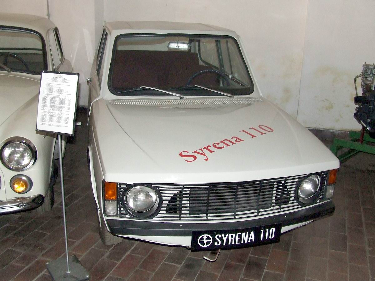 Syrena 110, prototyp